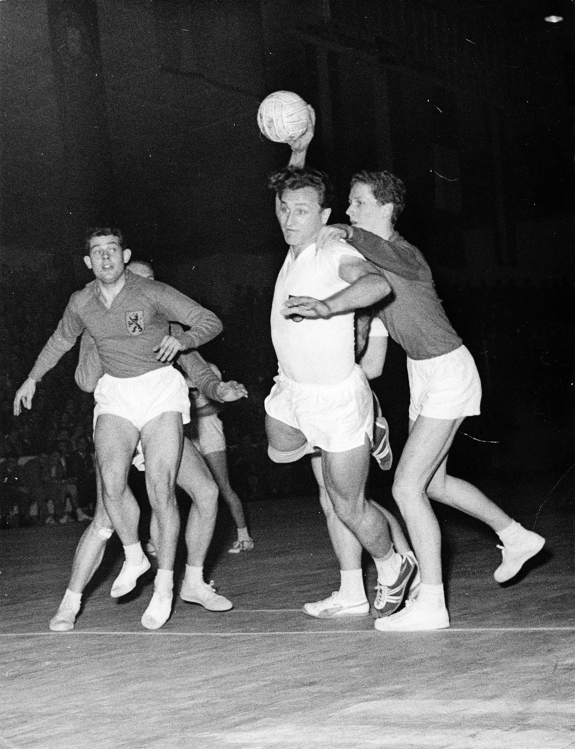 Hallenhandball-Weltmeisterschaft der Herren 1961, Spiel Gruppe B: Deutschland 33:7 Niederlande (März 1961, Berliner Sportpalast) Mitte: Hans Haberhauffe (D), Links Horselenberg (NL), Rechts Rinkel (NL).